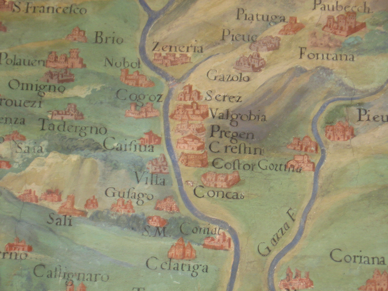 Mappa della zona di Concesio contenuta nella galleria delle mappe ai Musei Vaticani